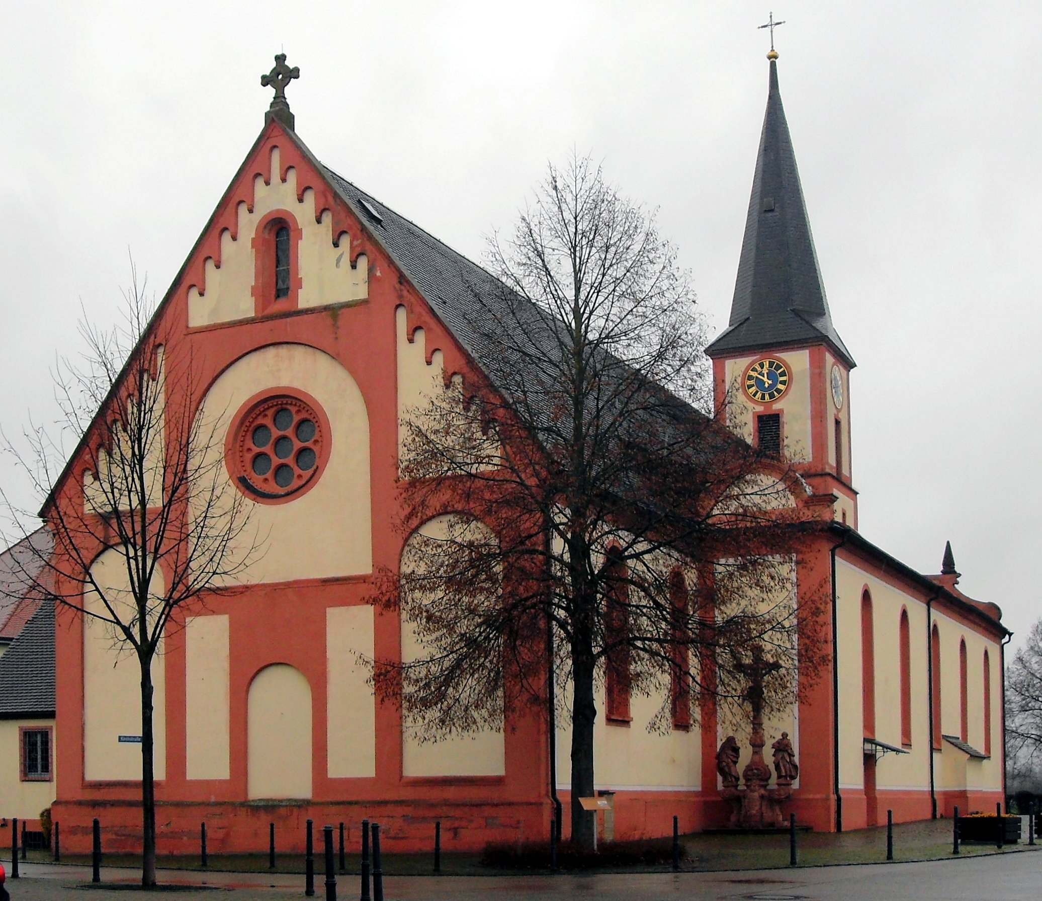 Pfarrkirche Petri in Ketten in Rust, Deutschland